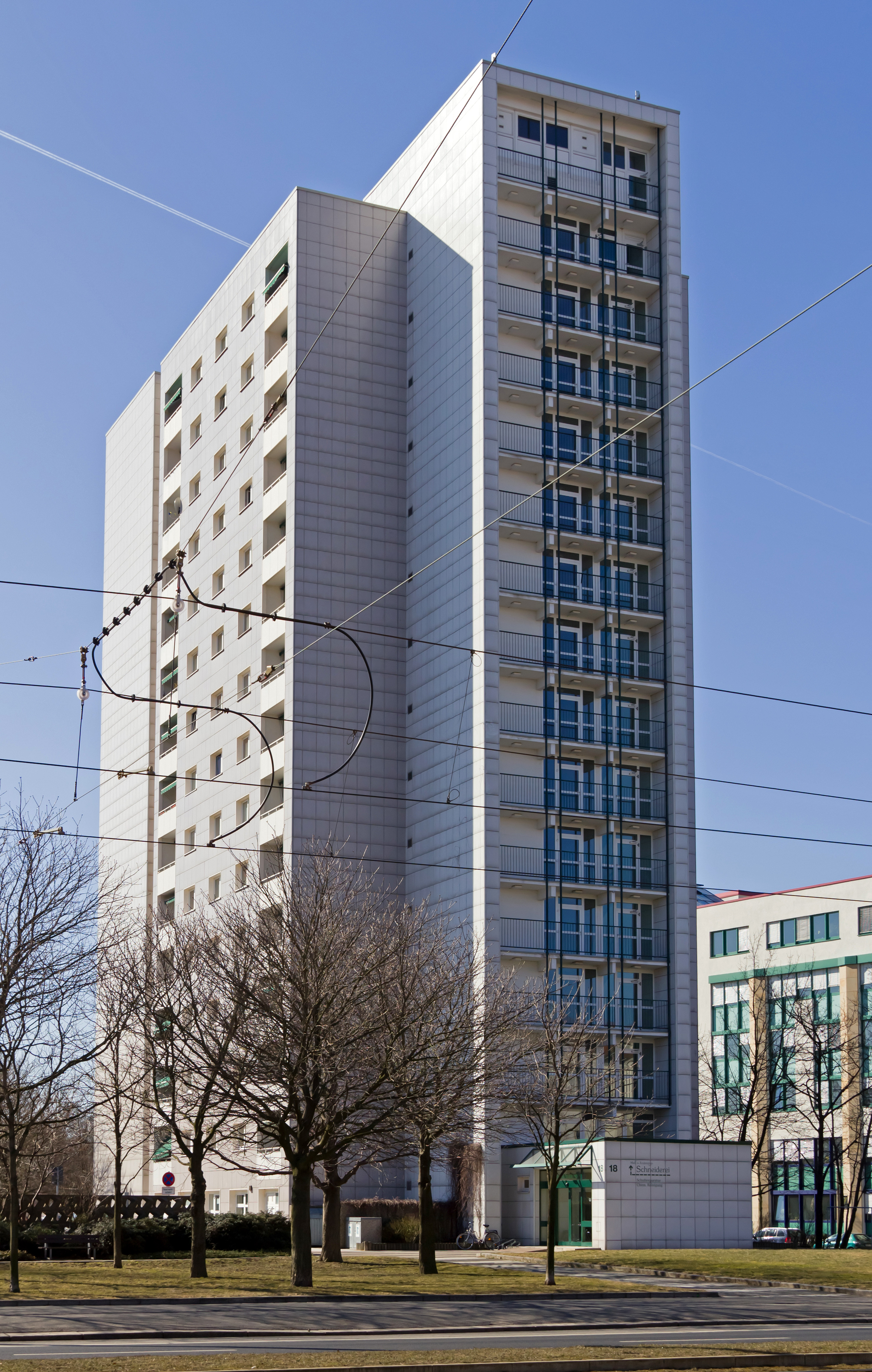 Grunaer Straße 18